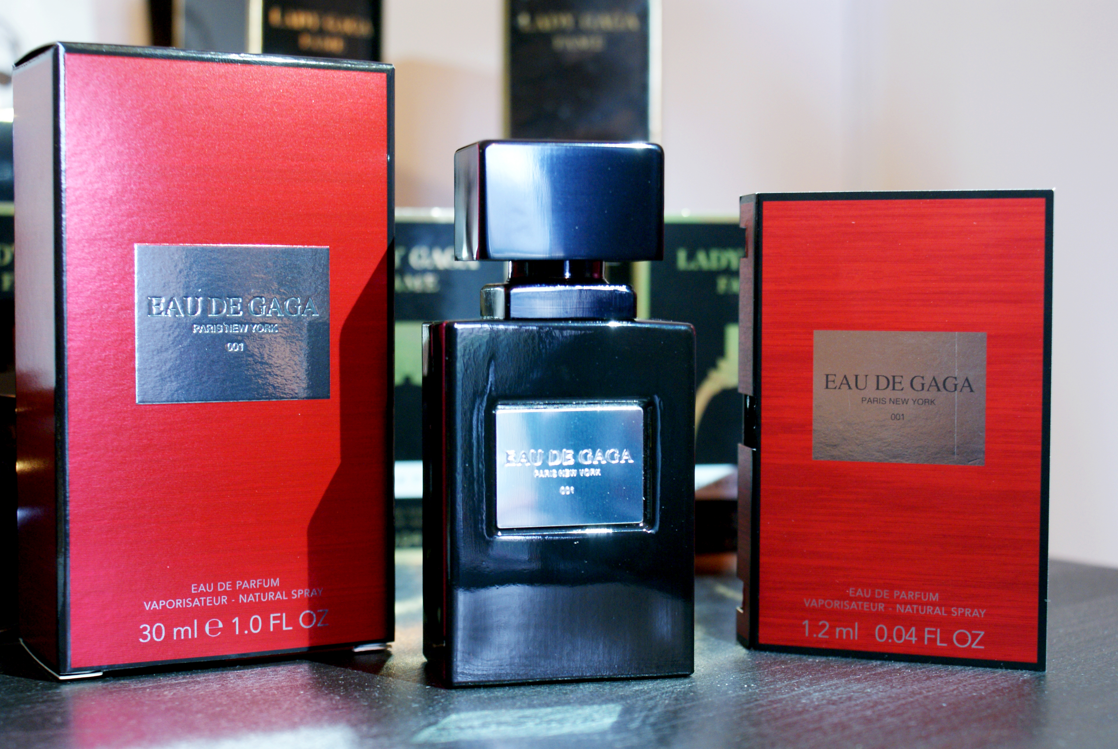 Eau de Gaga La nuova fragranza di Lady Gaga